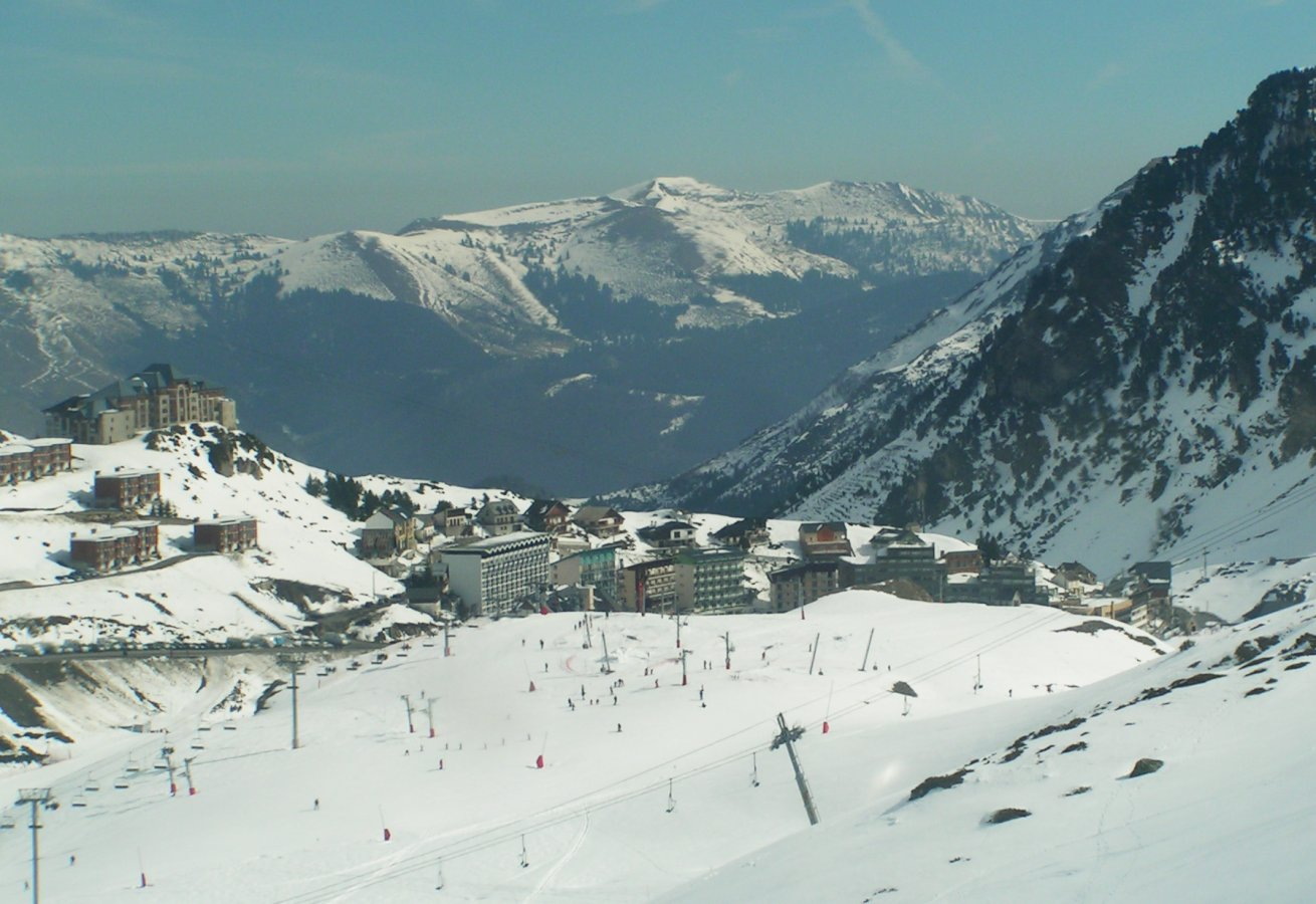 La Mongie ski resort — in the mountains of Hautes-Pyrénées region.